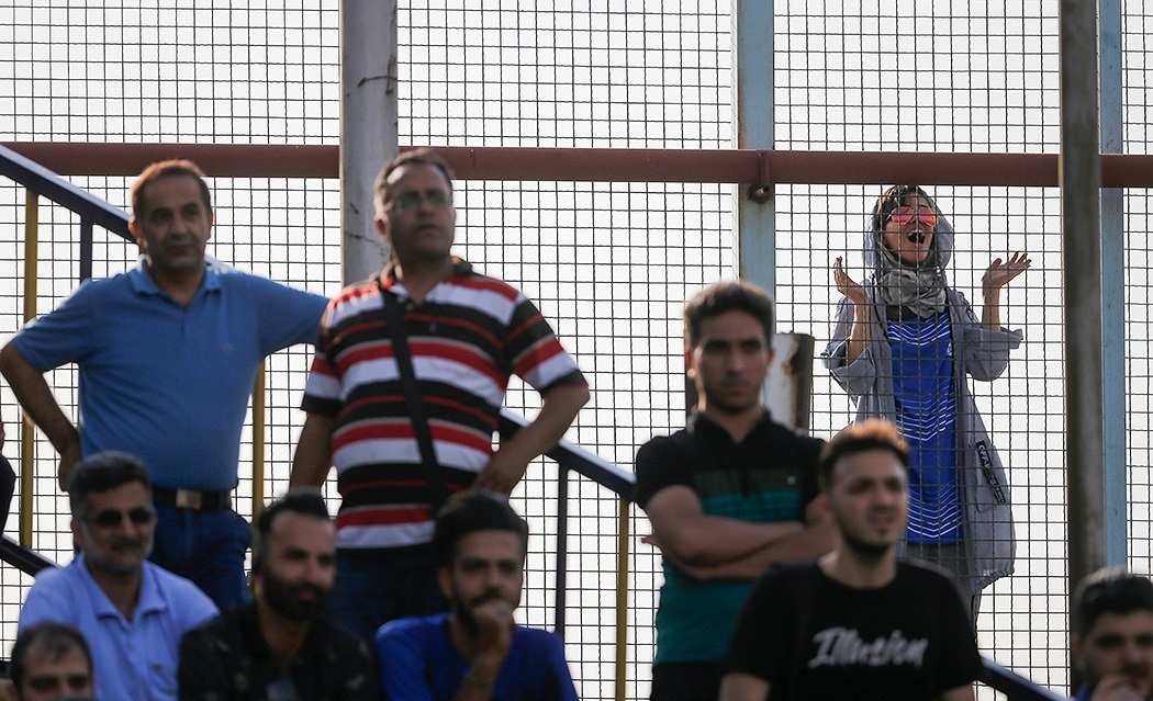 اولین تمرین استقلال با حضور هواداران